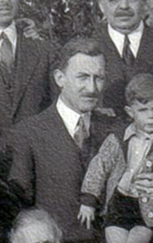 Antonio Bastos dentro de una foto familiar